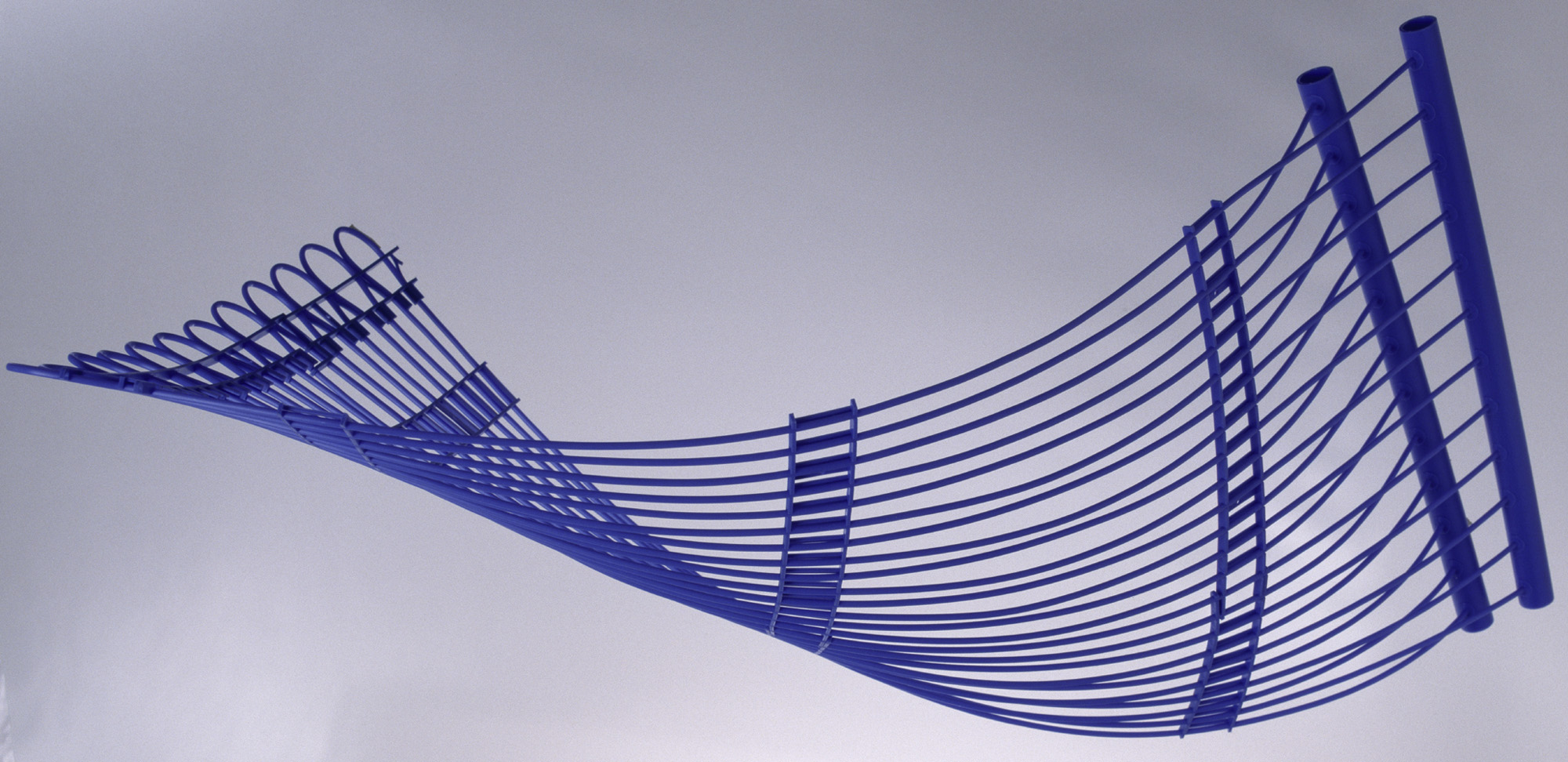 Kapillarrohrmatte für Flächenheizung und Flächenkühlung